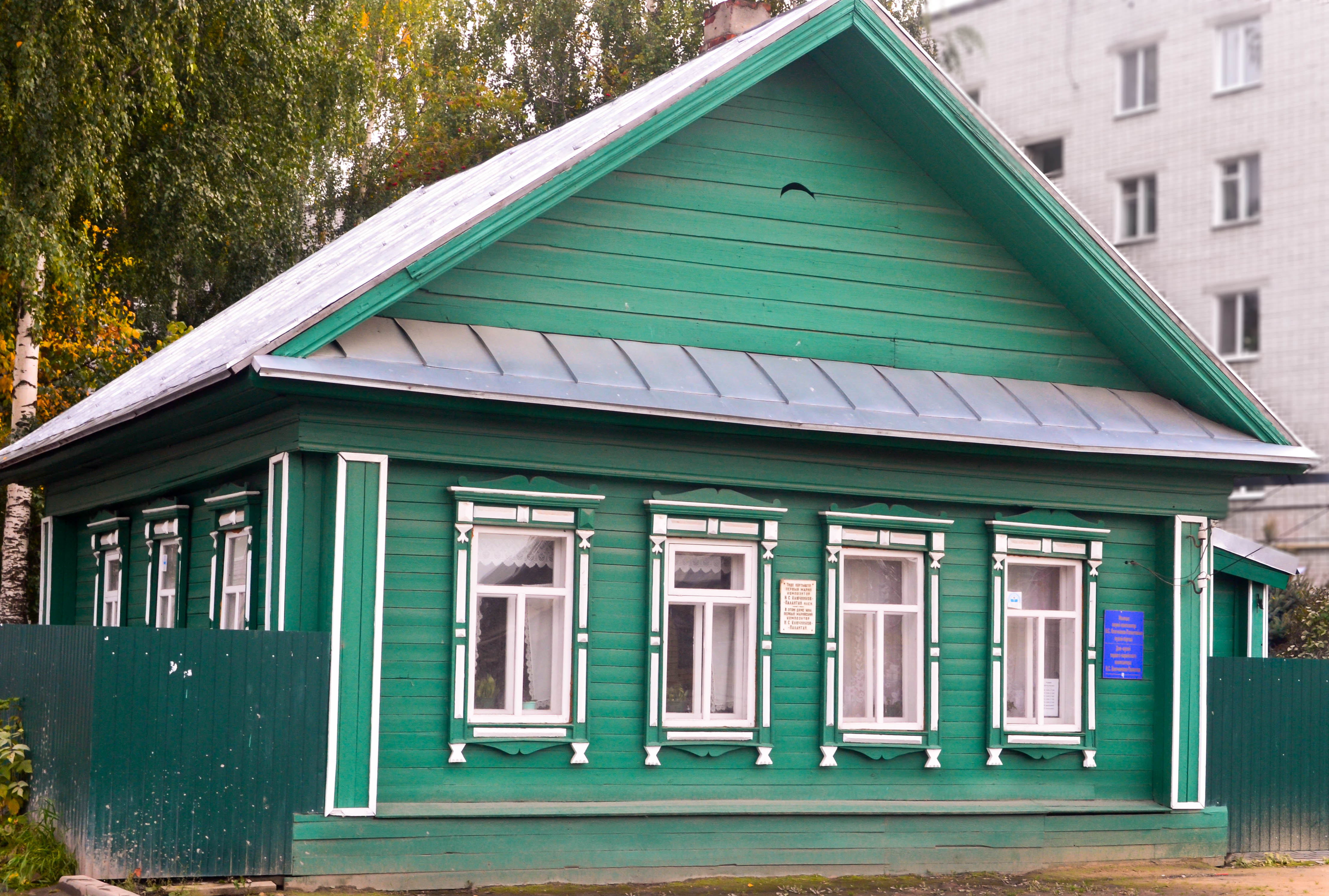 Дом, в котором жил композитор Ключников-Палантай И.С.: улица Льва Толстого, 25, Йошкар-Ола, Марий Эл